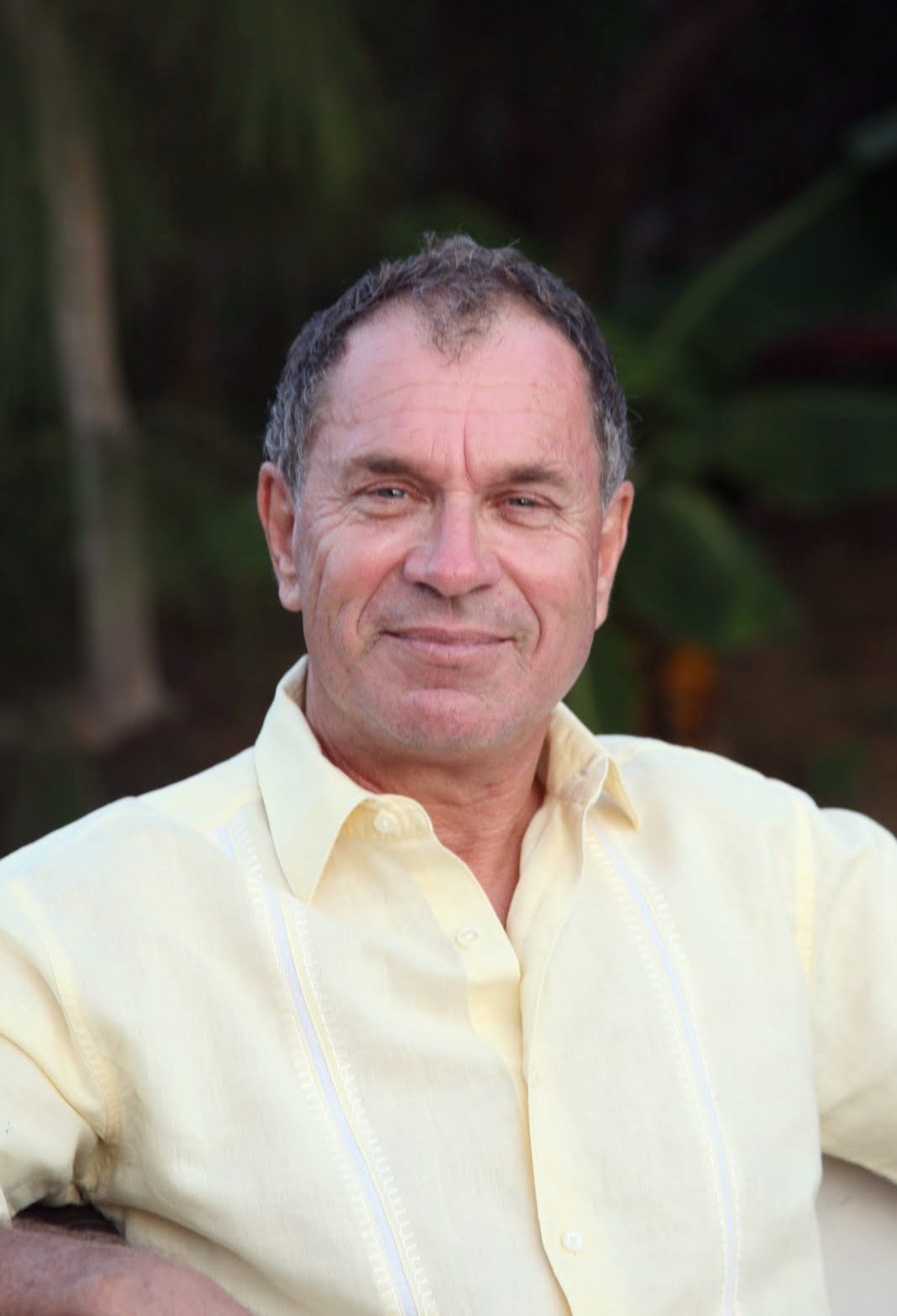 Portret van auteur Eric de Brabander